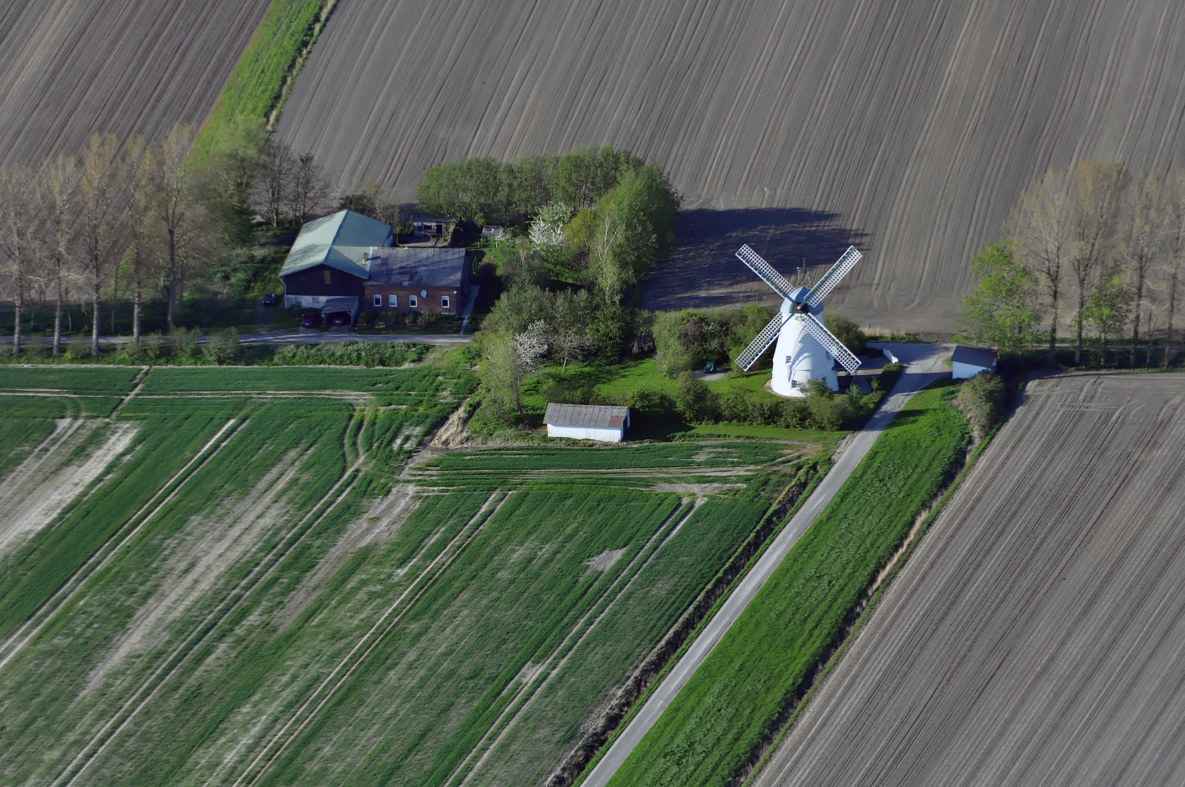 Luftbilder von der Nordseeküste 2012-05